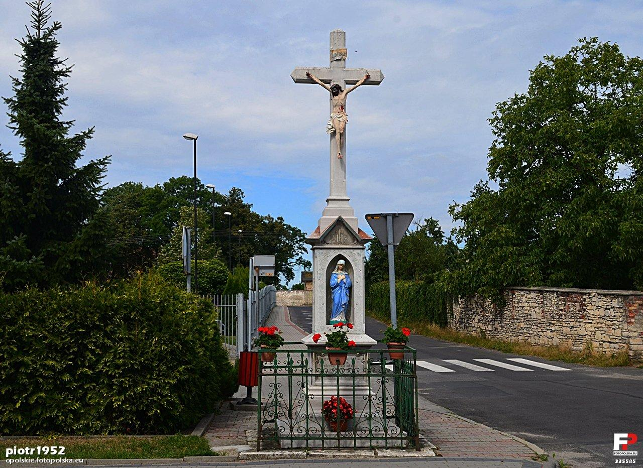 Krzyż przydrożny - 14.9.1904